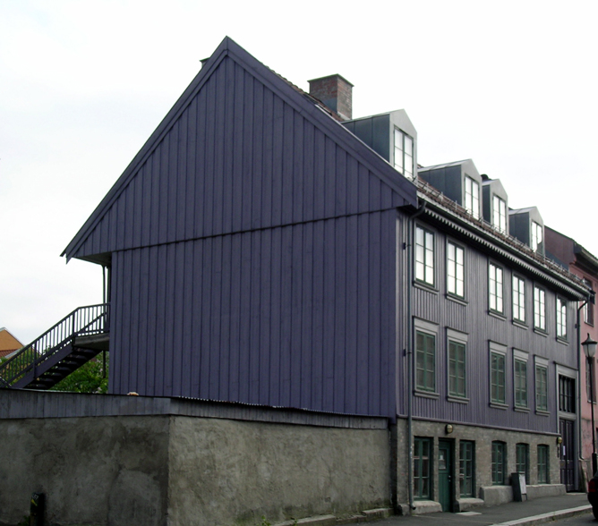 Øvre gate 2B, Oslo, Norway.